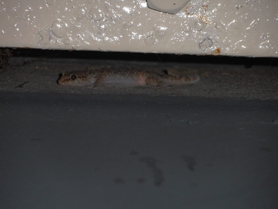 Török gekkó egy szálloda függőleges falán. Blue waters club